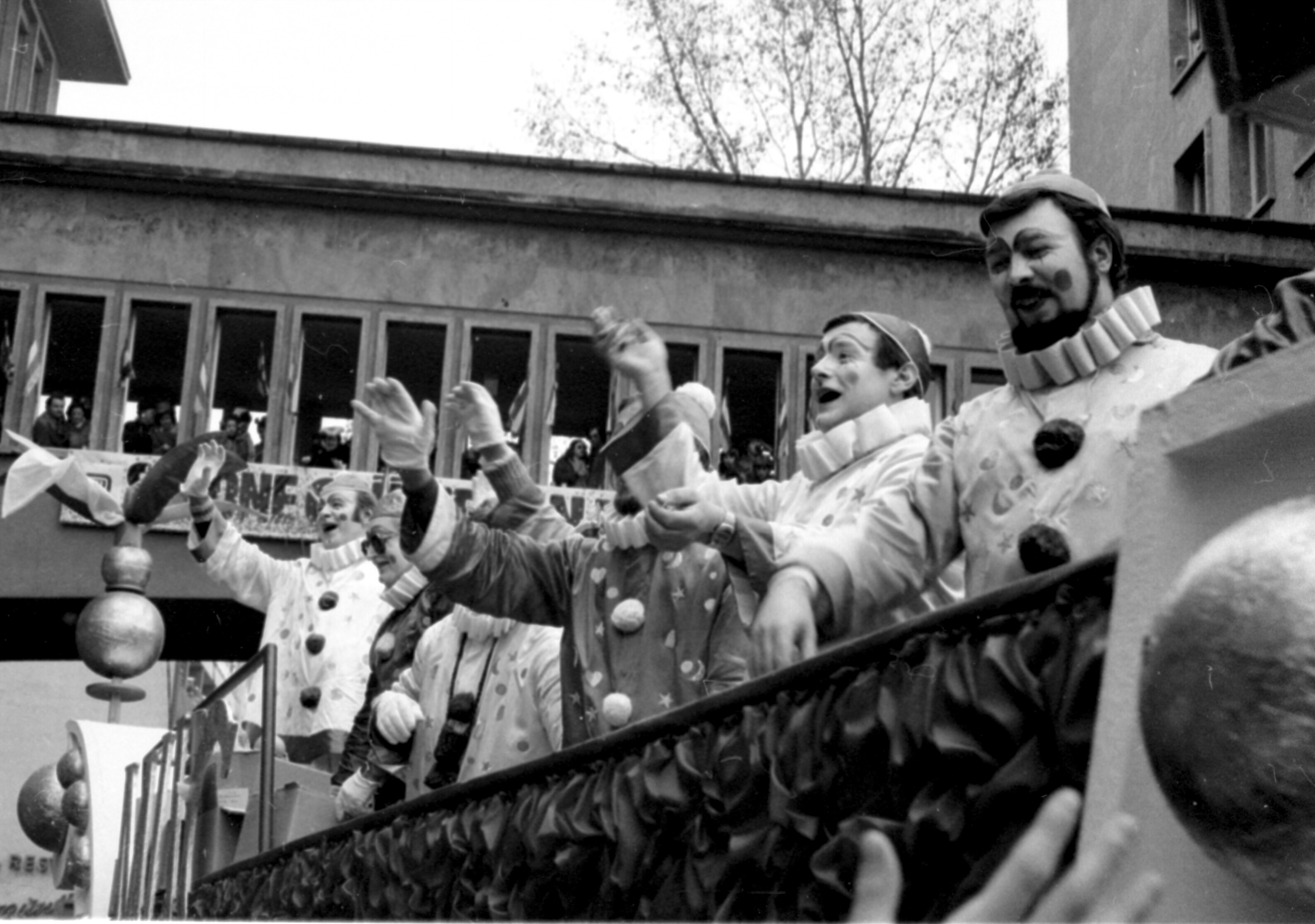 Mainzer Rosenmontagsumzug 1981 am 2. März 1981; Die Mainzer Hofsänger